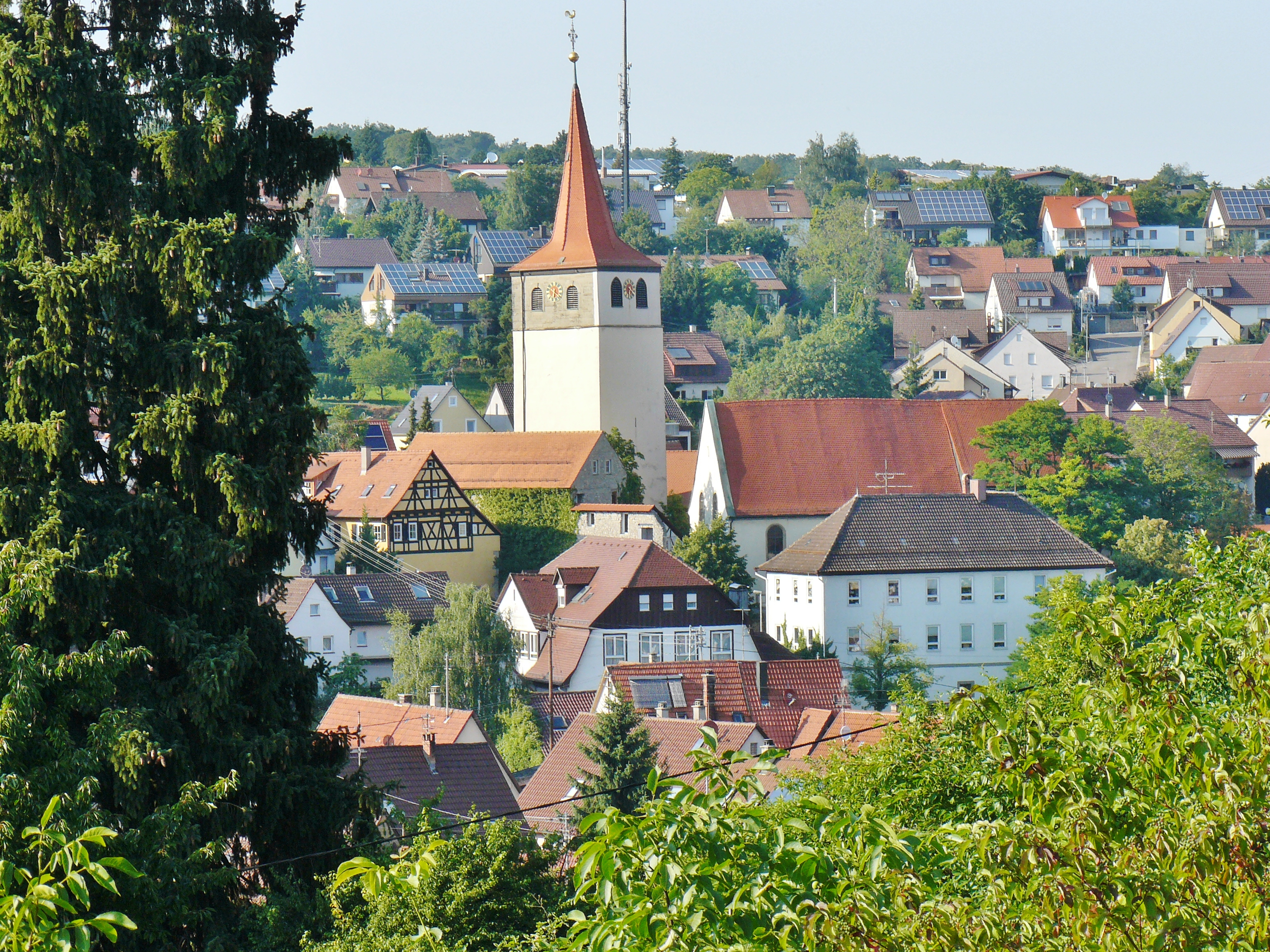 Weissach